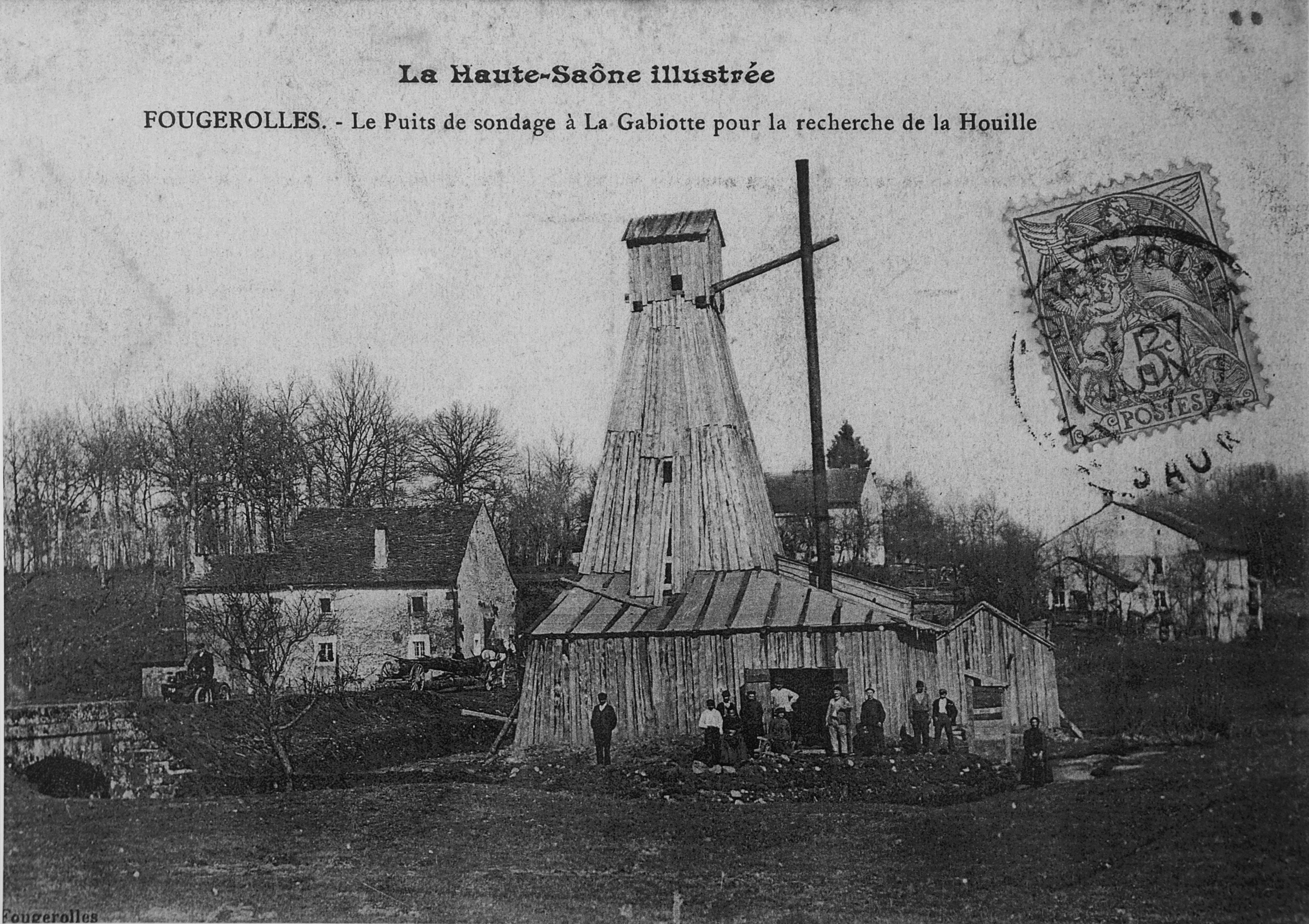 Sondage entrepris à La Gabiotte (Fouferolles, France) pour la recherche de la houille.